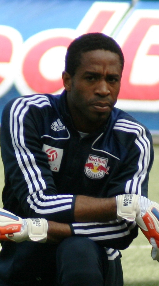 Eddie Gustafsson